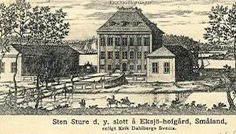 Ekesjöhovgård utanför Sävsjö som det avbildades av Erik Dahlberg i Suecia Antiqua et Hodierna